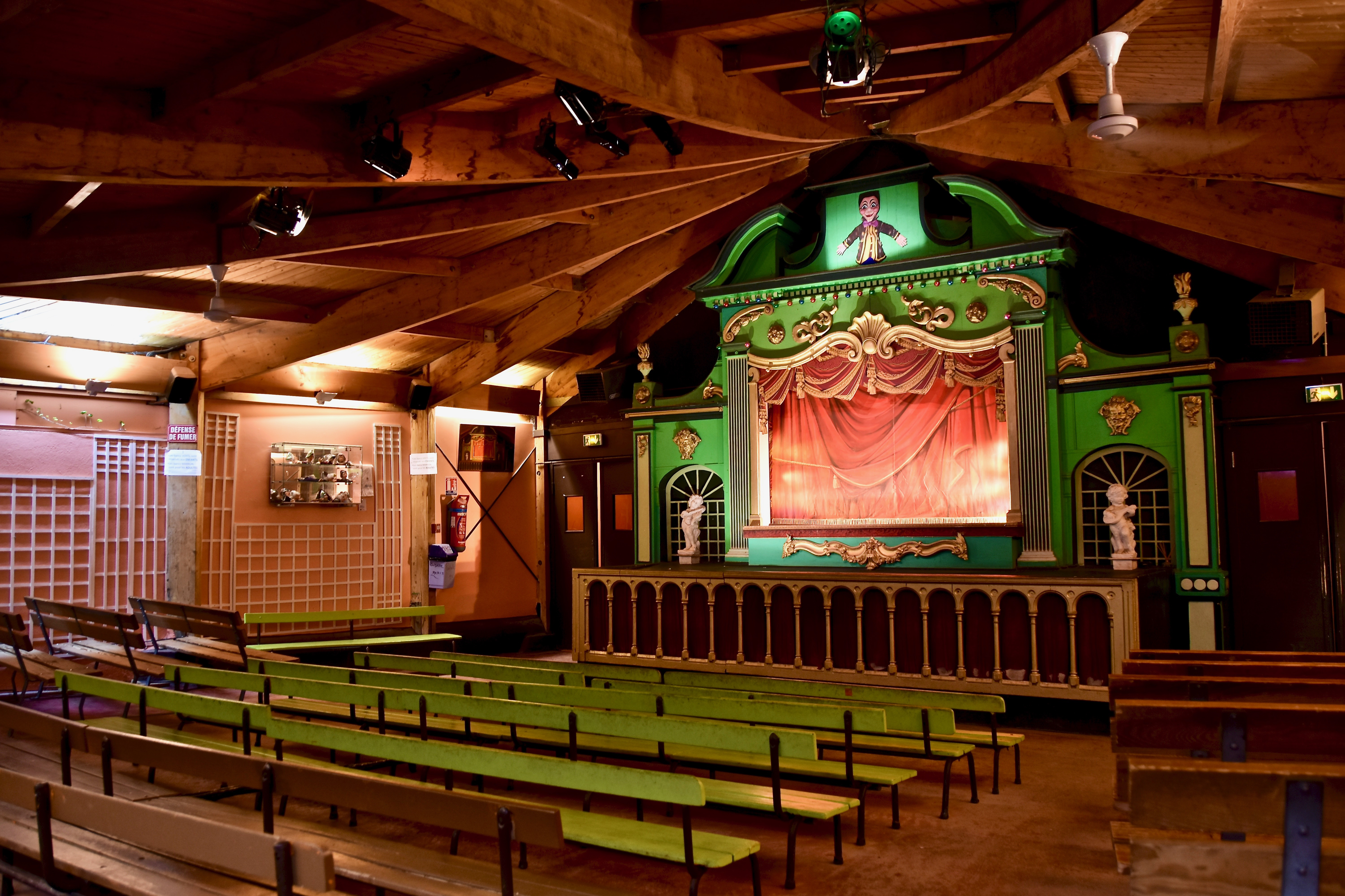 le castelet du théâtre des marionnettes du Champ de Mars